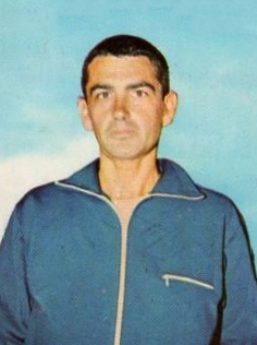 FIGURINA PANINI CAMPIONI DELLO SPORT 1969/70 - 42 ATLETICA RON CLARKE